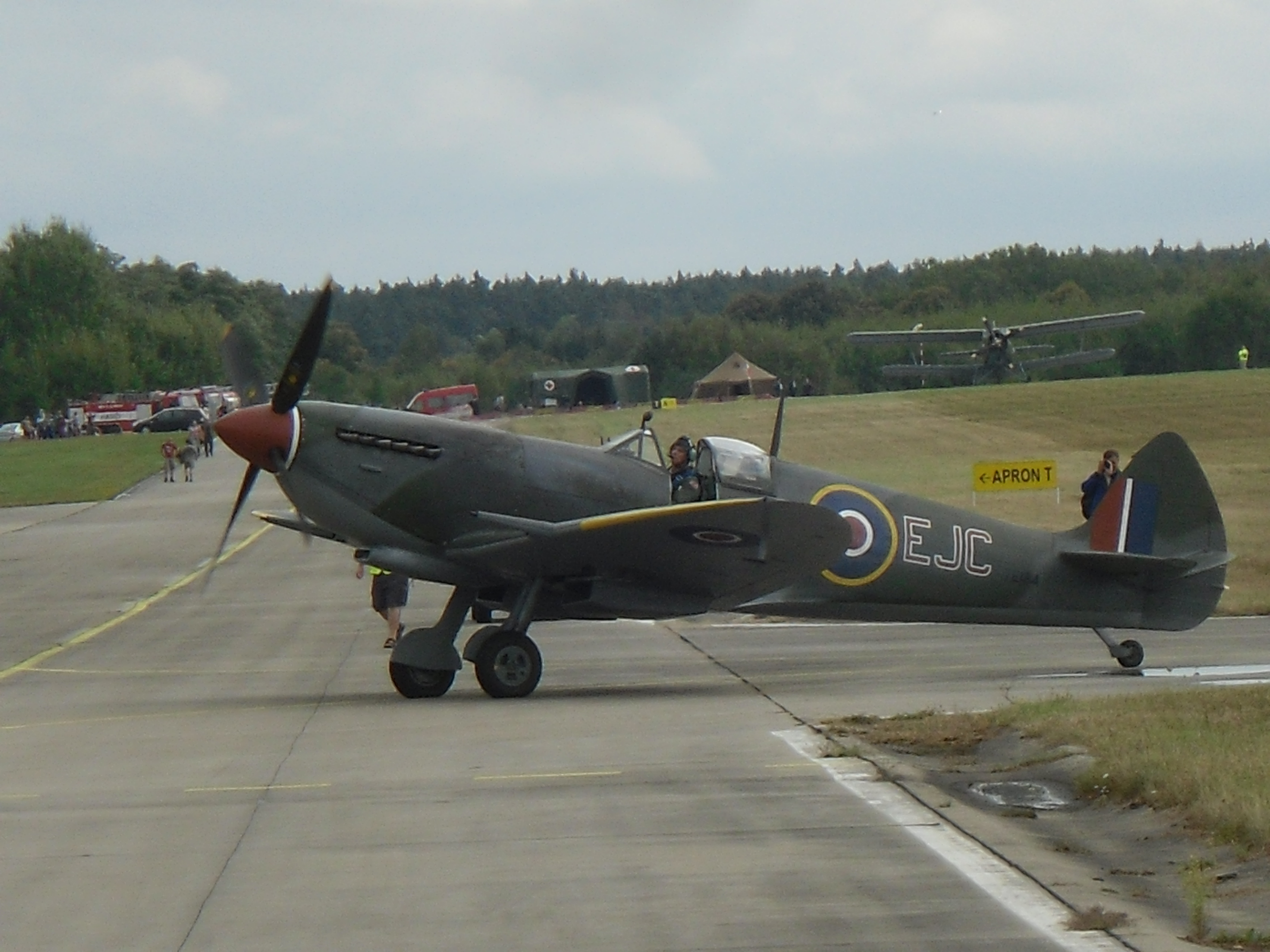 Supermarine Spitfire Plzeň